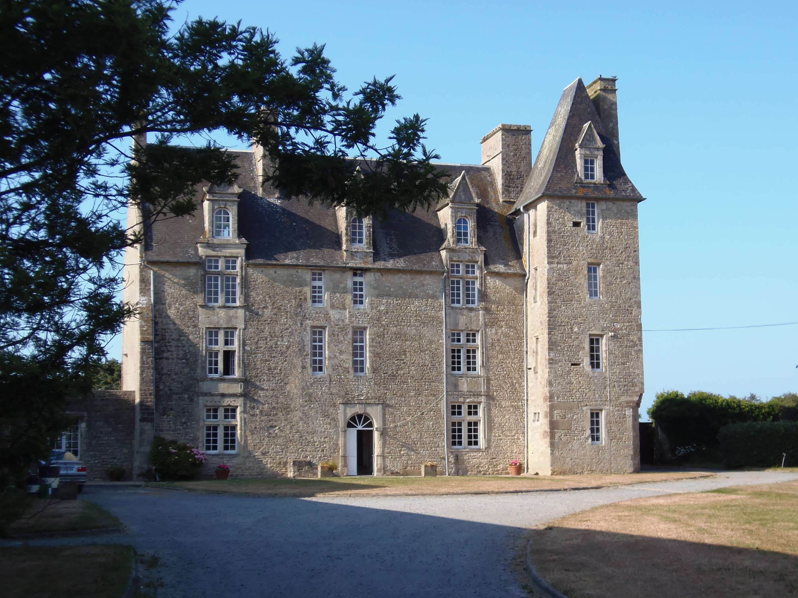 Saint-Pierre-du-Mont (Normandie, France). Le château (inscrit). .